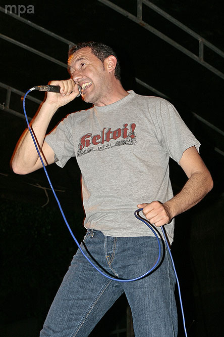 Sime durante un concierto en las Fiestas de Coia 2012 (Vigo)